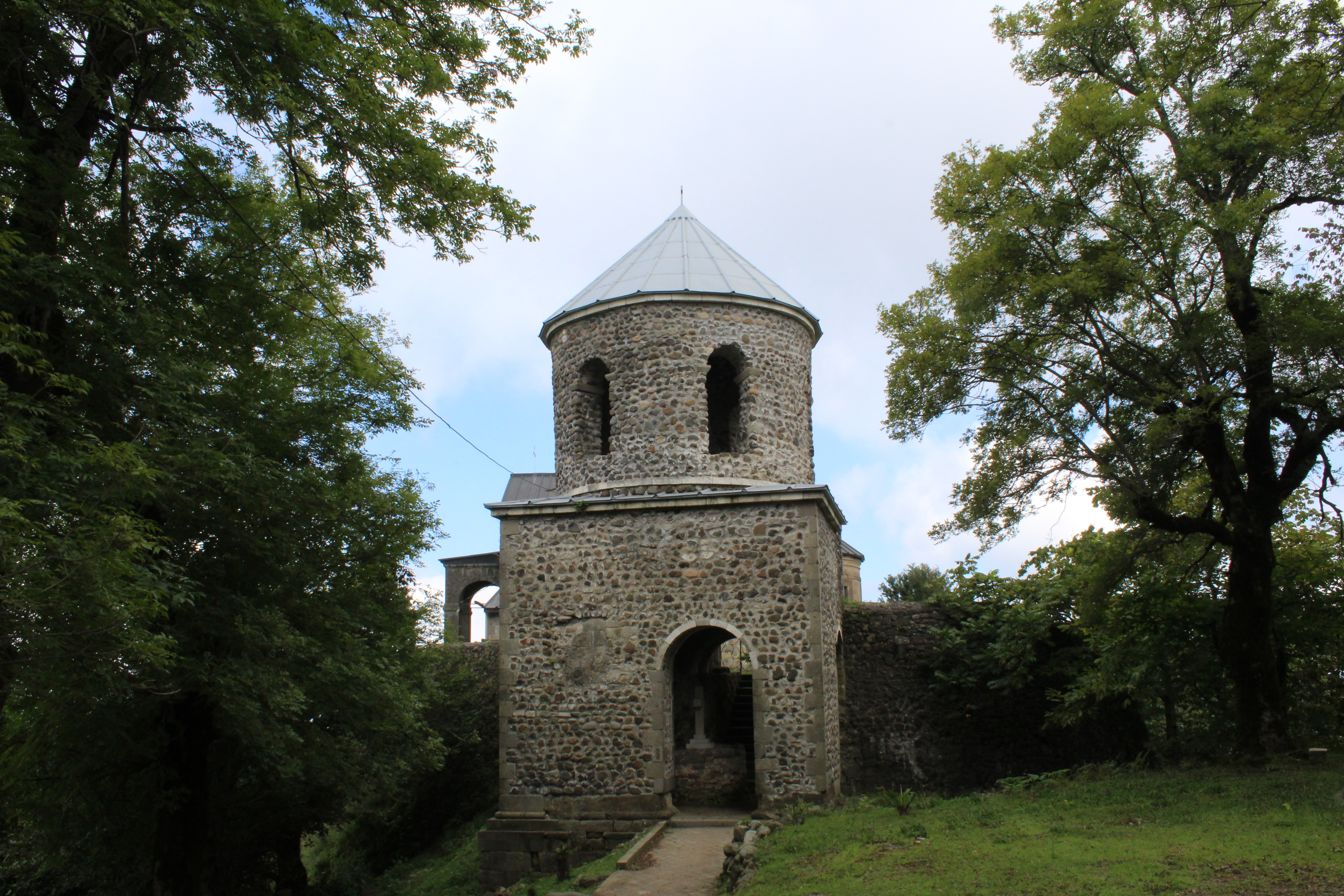 ჯუმათის ეკლესიის სამრეკლო